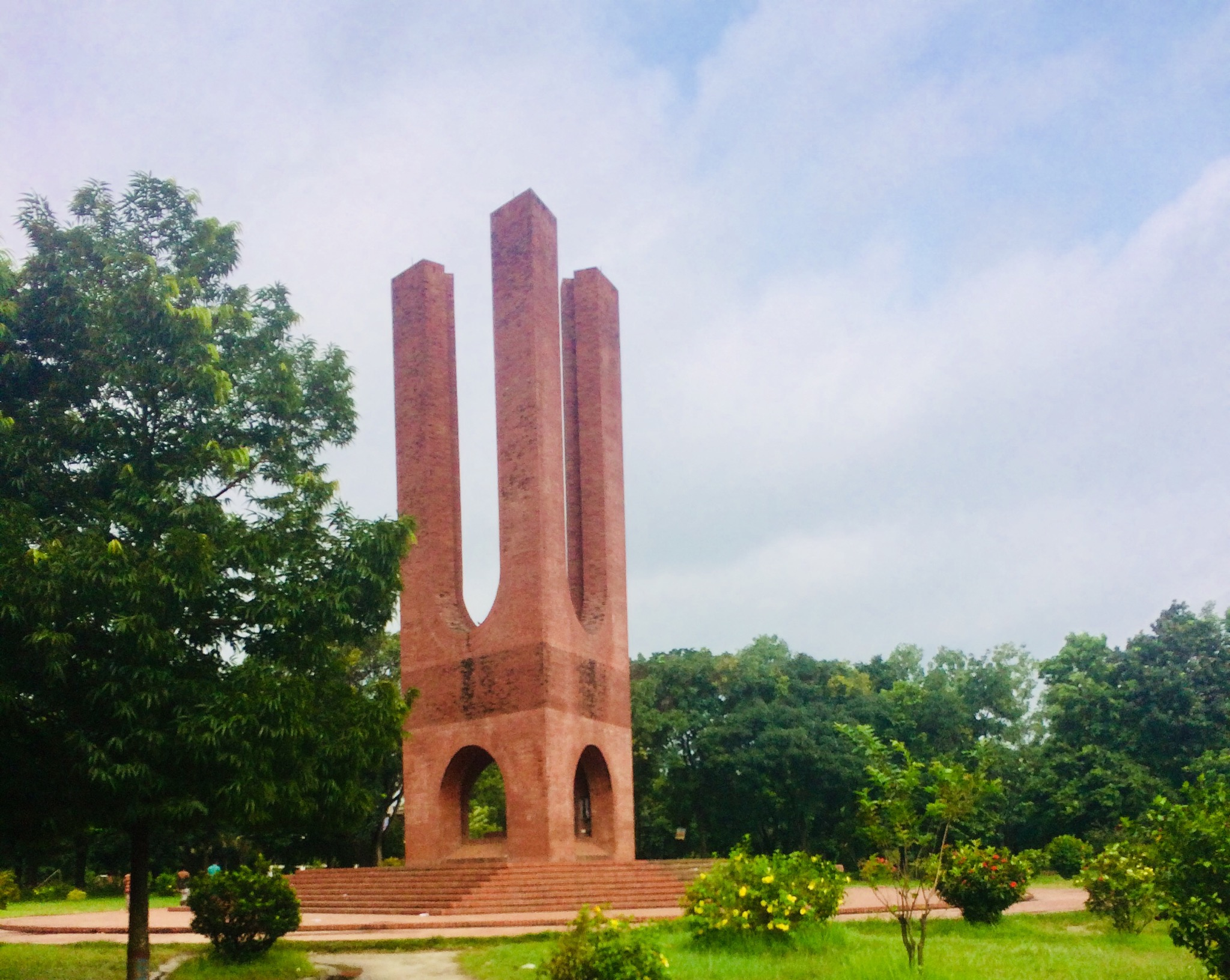 শহীদ মিনার (জাহাঙ্গীরনগর বিশ্ববিদ্যালয়)